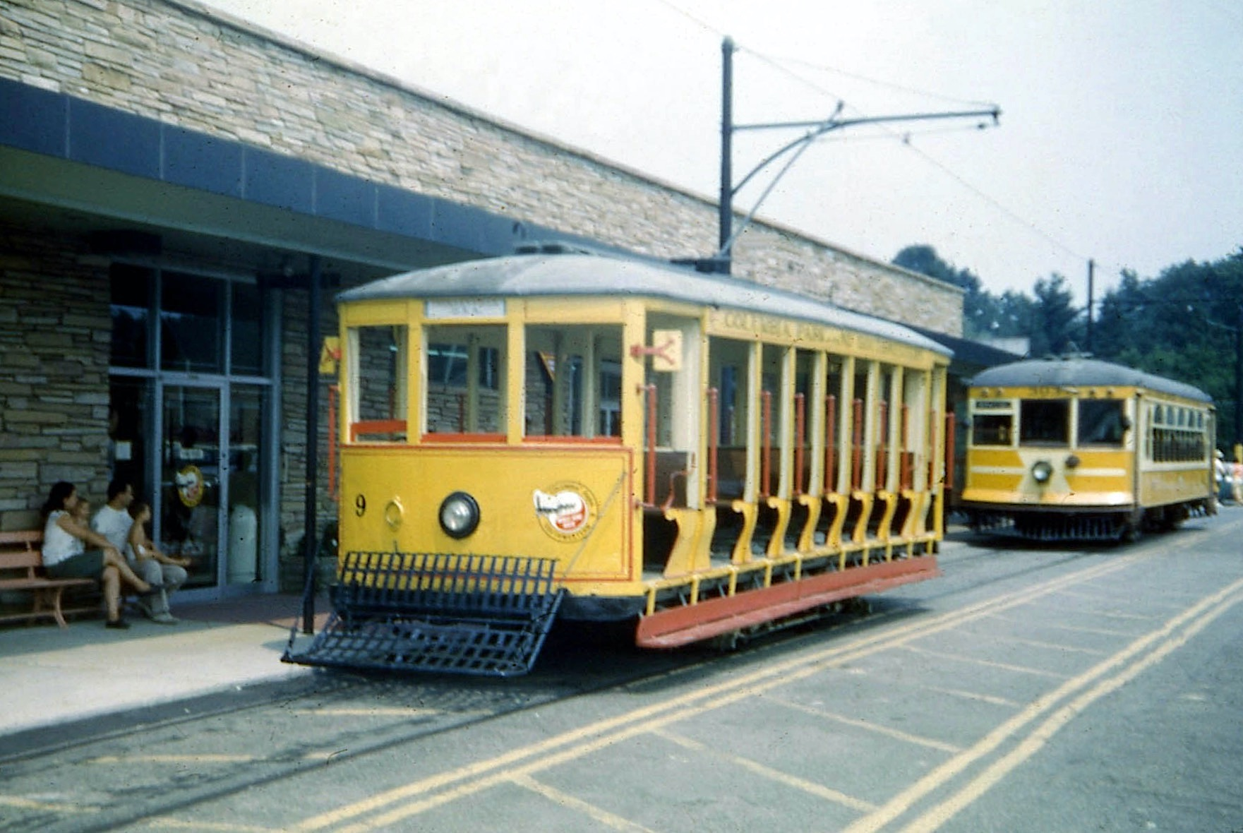 19660807 03 Trolleyville USA